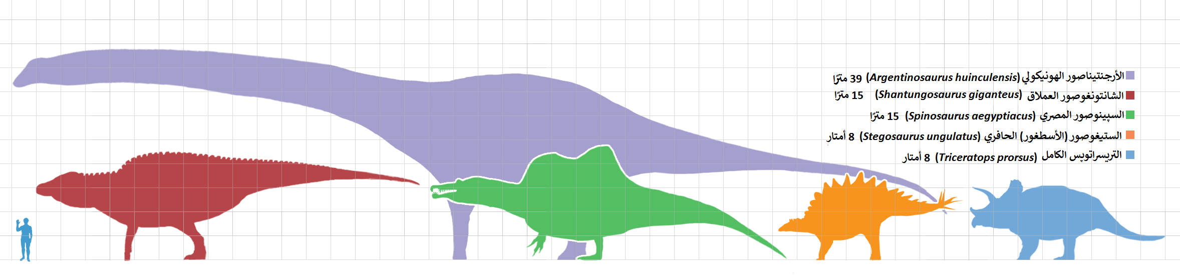 رسم بياني يُظهر أحجام أكبر أنواع الديناصورات المعروفة (الطول والكتلة) من خمسة فروع حيوية: طويلات الأعناق أو الصوروبودات (Argentinosaurus huinculensis)، وطيرية القدم أو الأورنيثوبودات (Shantungosaurus giganteus)، الثيروبودات (Spinosaurus aegyptiacus)، والمُدرعات (Stegosaurus ungulatus) ومُهدبة الرأس (Triceratops prorsus). مُقارنة بحجم الإنسان. كل مربع يُقابله متر مُربع واحد. *مُقتبسة من رسومات بيانية صنعها كل من: ArthurWeasley، Steveoc 86، Dropzink، وPiotr Jaworski